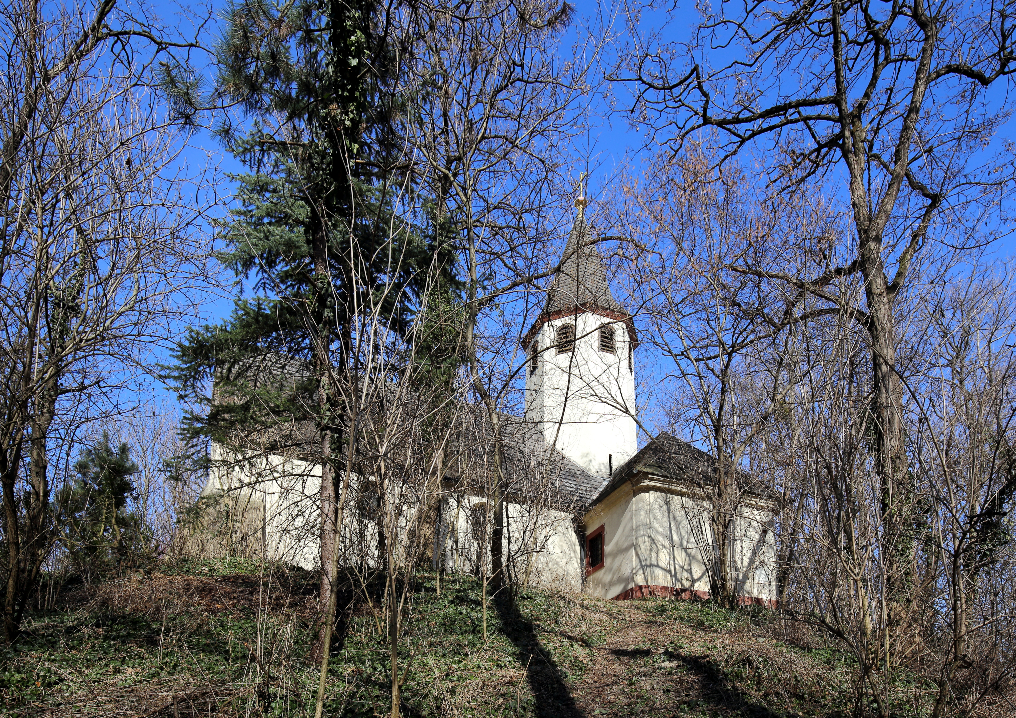 Südwestansicht der katholischen Filialkirche hl. Johannes in Oberhausen, ein Ortsteil der niederösterreichischen Stadt Groß-Enzersdorf. Der heutige Kirchenbau stammt urkundlich aus dem Jahr 1652/53. Er steht auf einem 7,5 Meter hohen künstlich aufgeschüttetem Erdhügel, der von einem Ringgraben umgeben ist. Hügel und Wassergraben waren ursprünglich Teil der Verteidigungsanlagen der Festung Sachsengang und wurden um das Jahr 1000 errichtet.